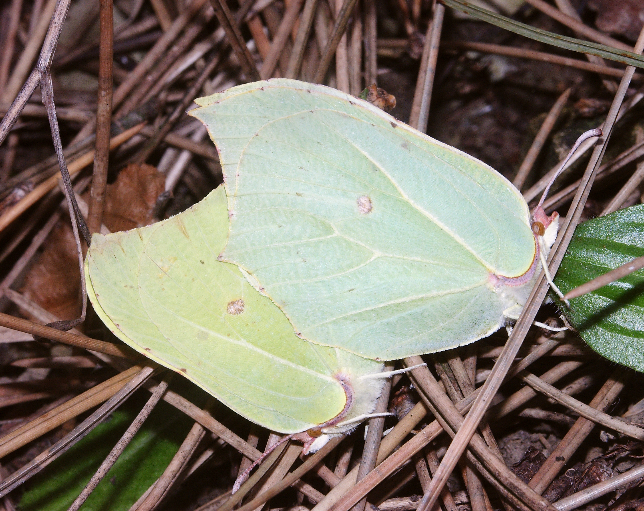 Gonepteryx rhamni, Tauberland, Germany